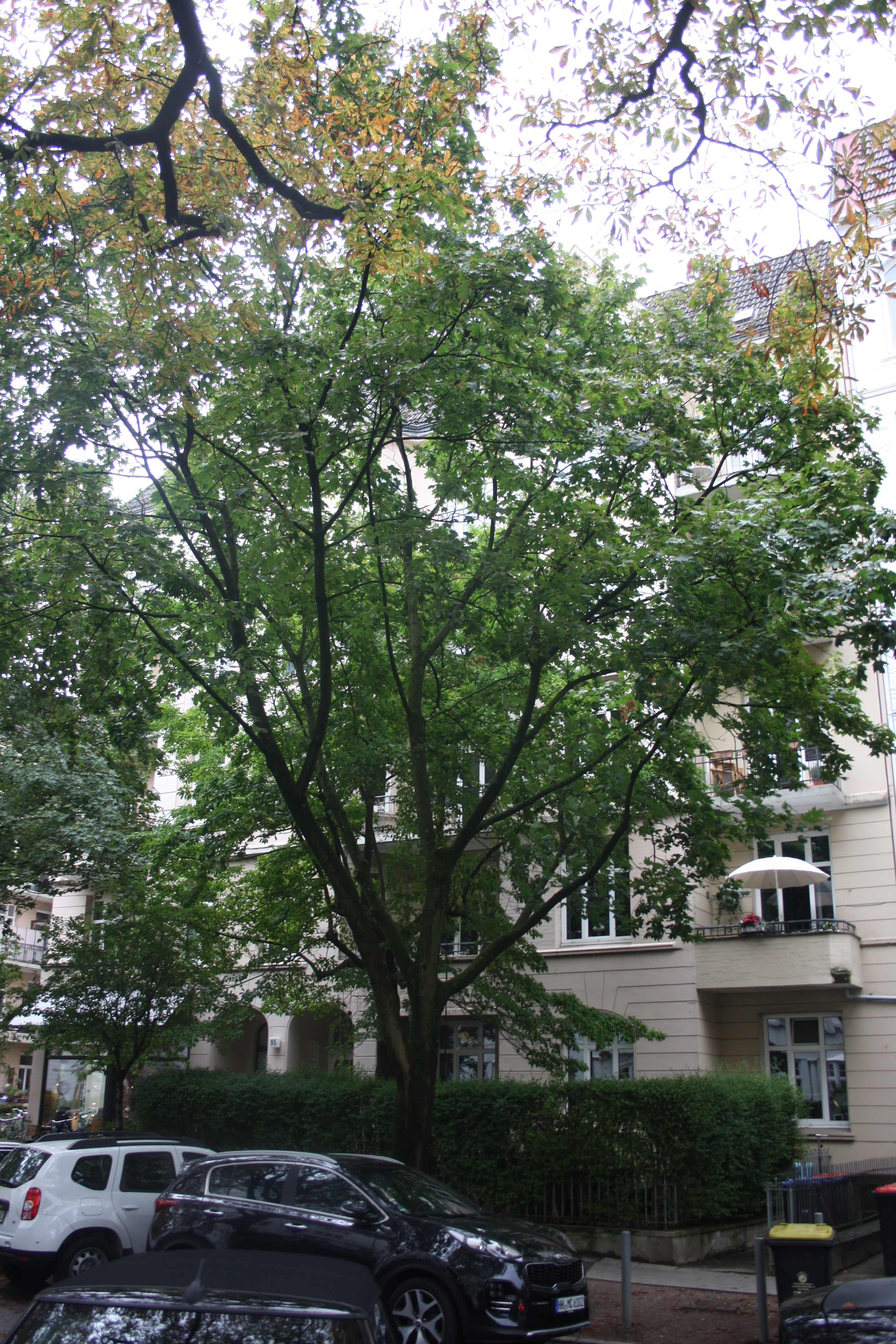 Wohnhaus in der Isestraße in Hamburg-Harvestehude Elternwohnung von Angela Merkel This is a photograph of an architectural monument.